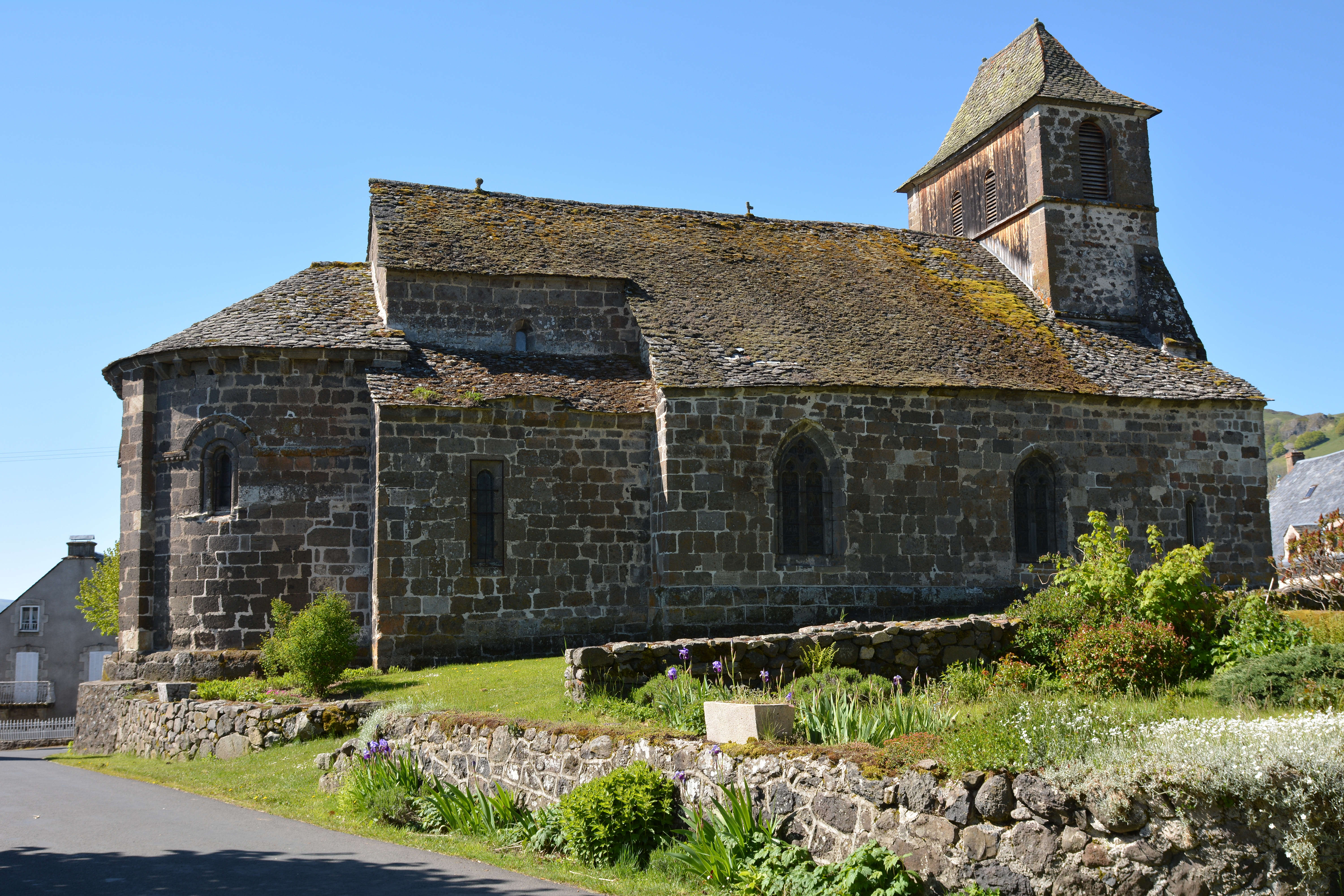 Vue extérieure de l'église de Saint-Hippolyte, Cantal, Auvergne, France